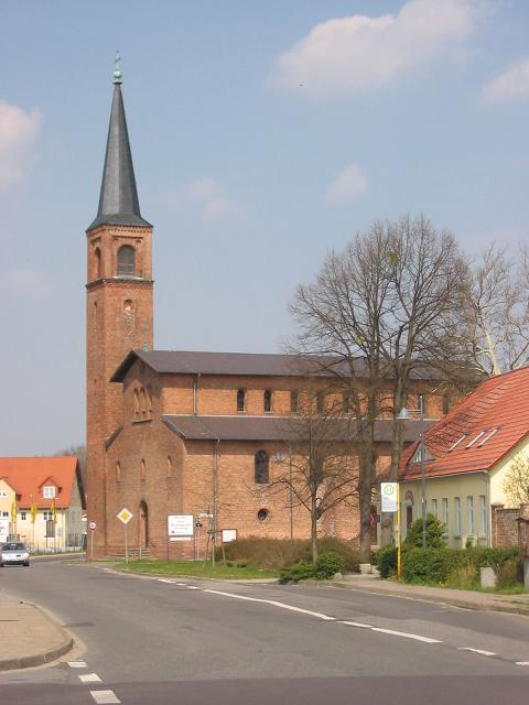 Kirche in Saarmund, Landkreis Potsdam-Mittelmark, Brandenburg. Selbst fotografiert, April 2004 GNU FDL